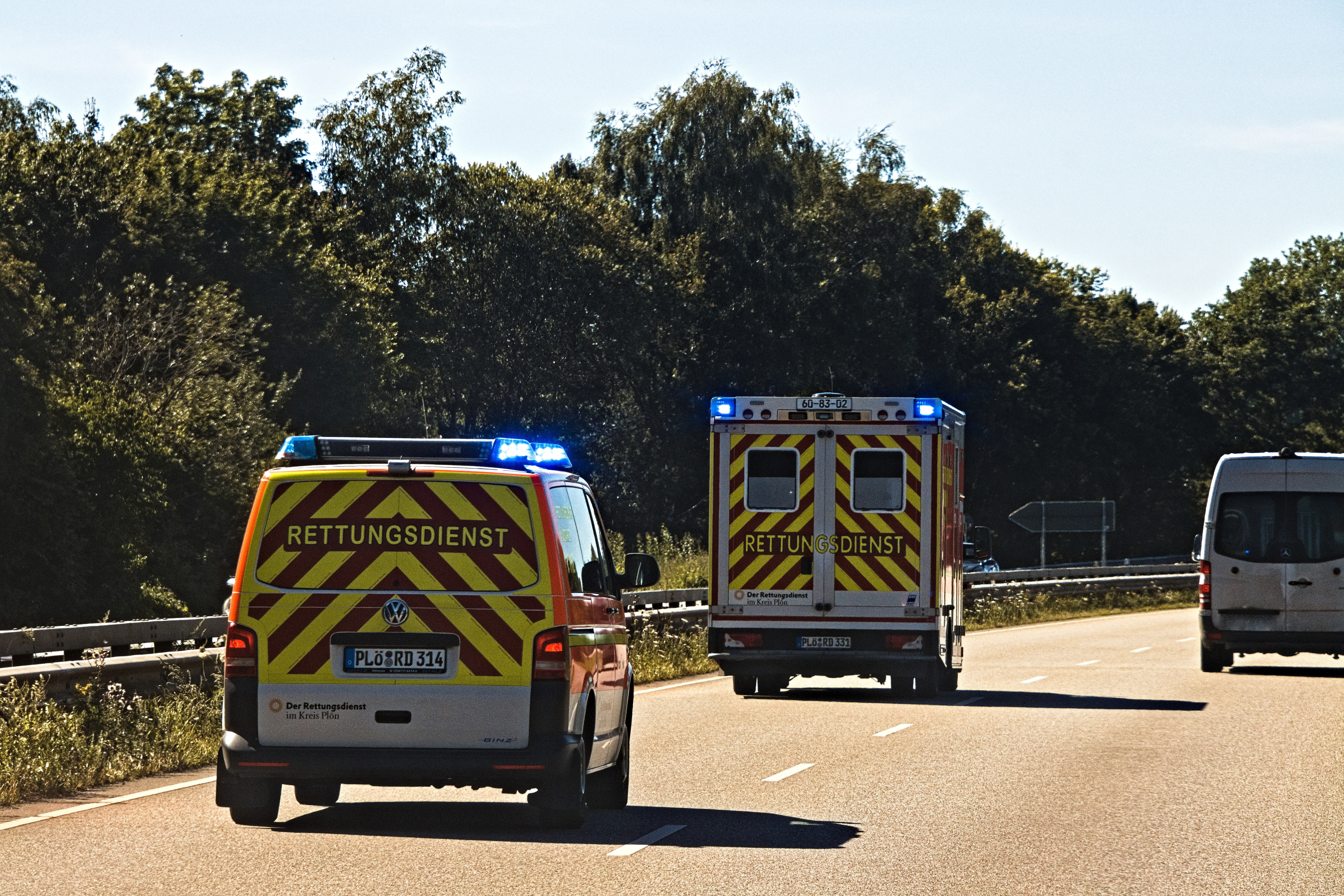 Ein Rettungswagen und ein Notarzteinsatzfahrzeug, aus dem Kreis Plön, mit eingeschaltetem Blaulicht. Beide Fahrzeuge mit Sonderrechten im Rendezvous-System Richtung Kiel auf der B76 Höhe Elmschenhagen.